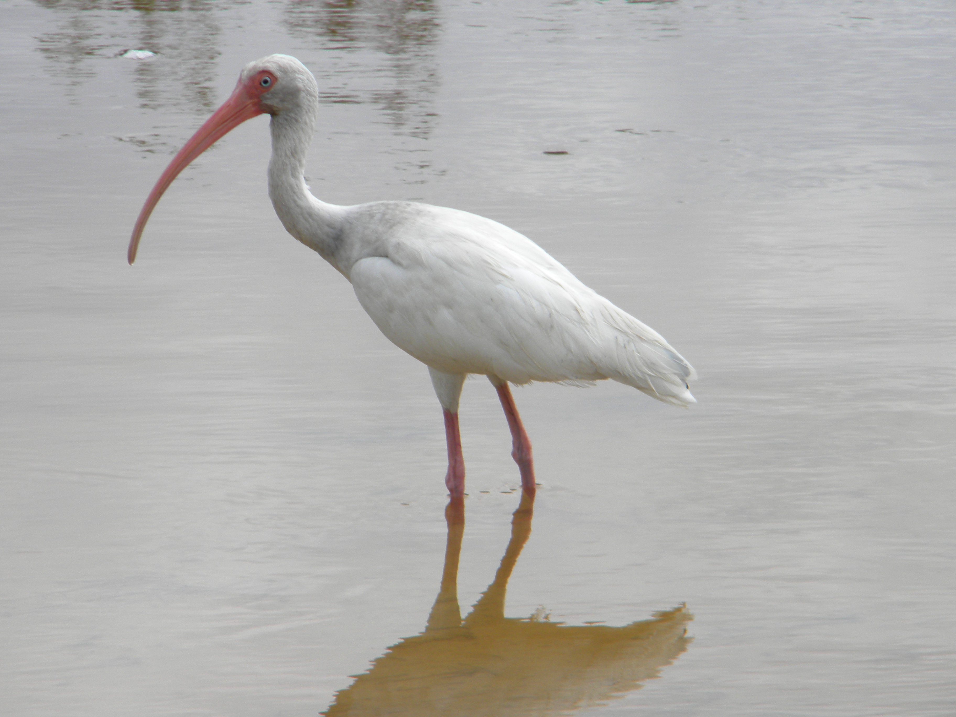 Eudocimus albus